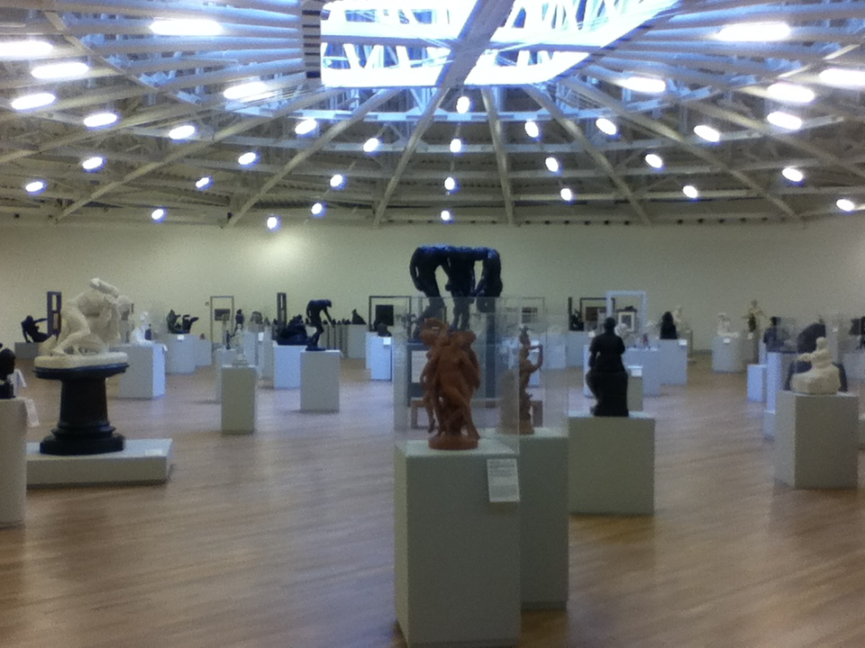 Esculturas en el Museo Soumaya.